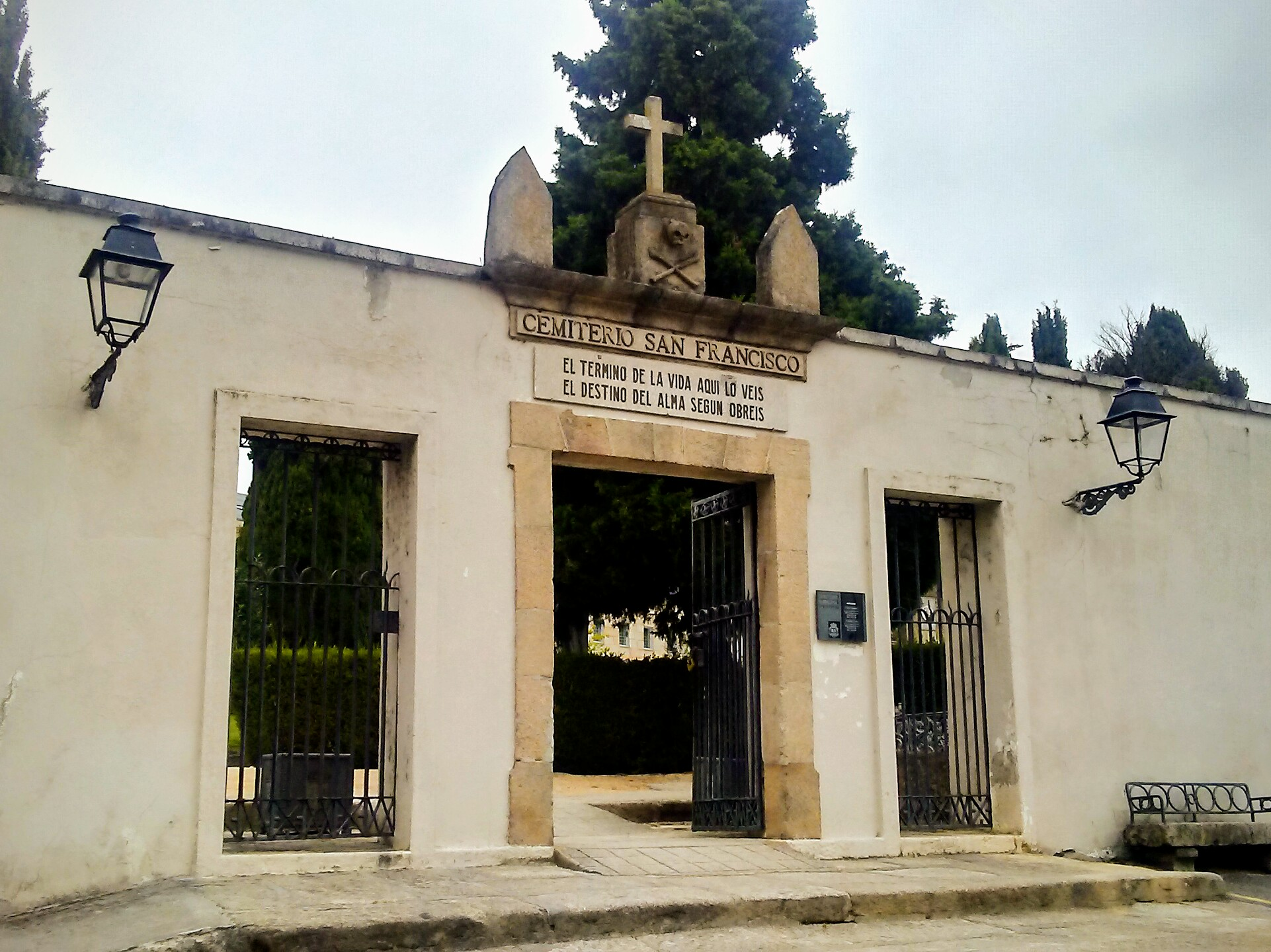 Entrada cementerio San Francisco (Ourense)